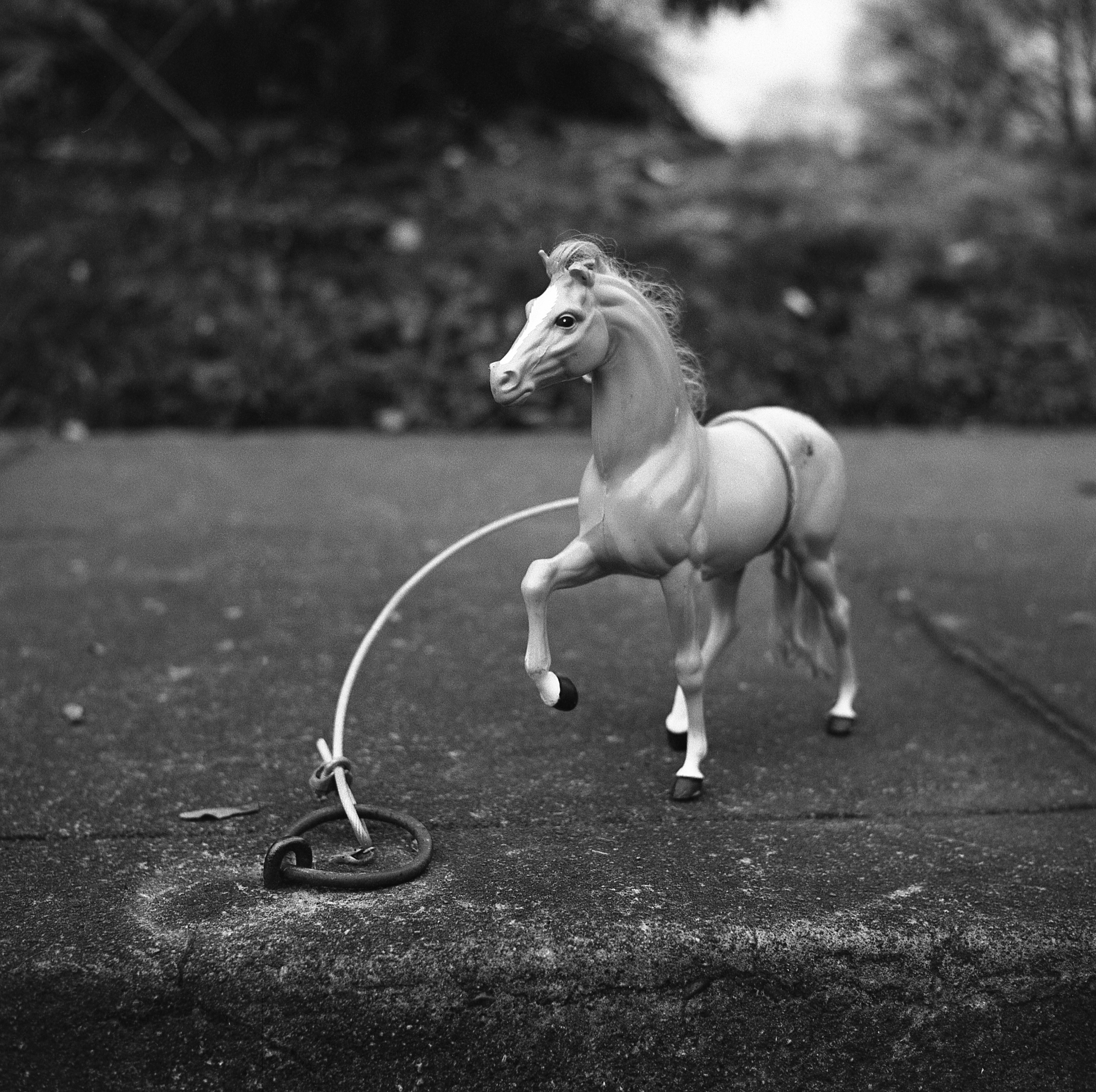 Taken in November 2008 in Portland, Oregon. Rolleiflex T, Zeiss Tessar 75mm f/3.5 and Fuji Neopan 400 in D-76.